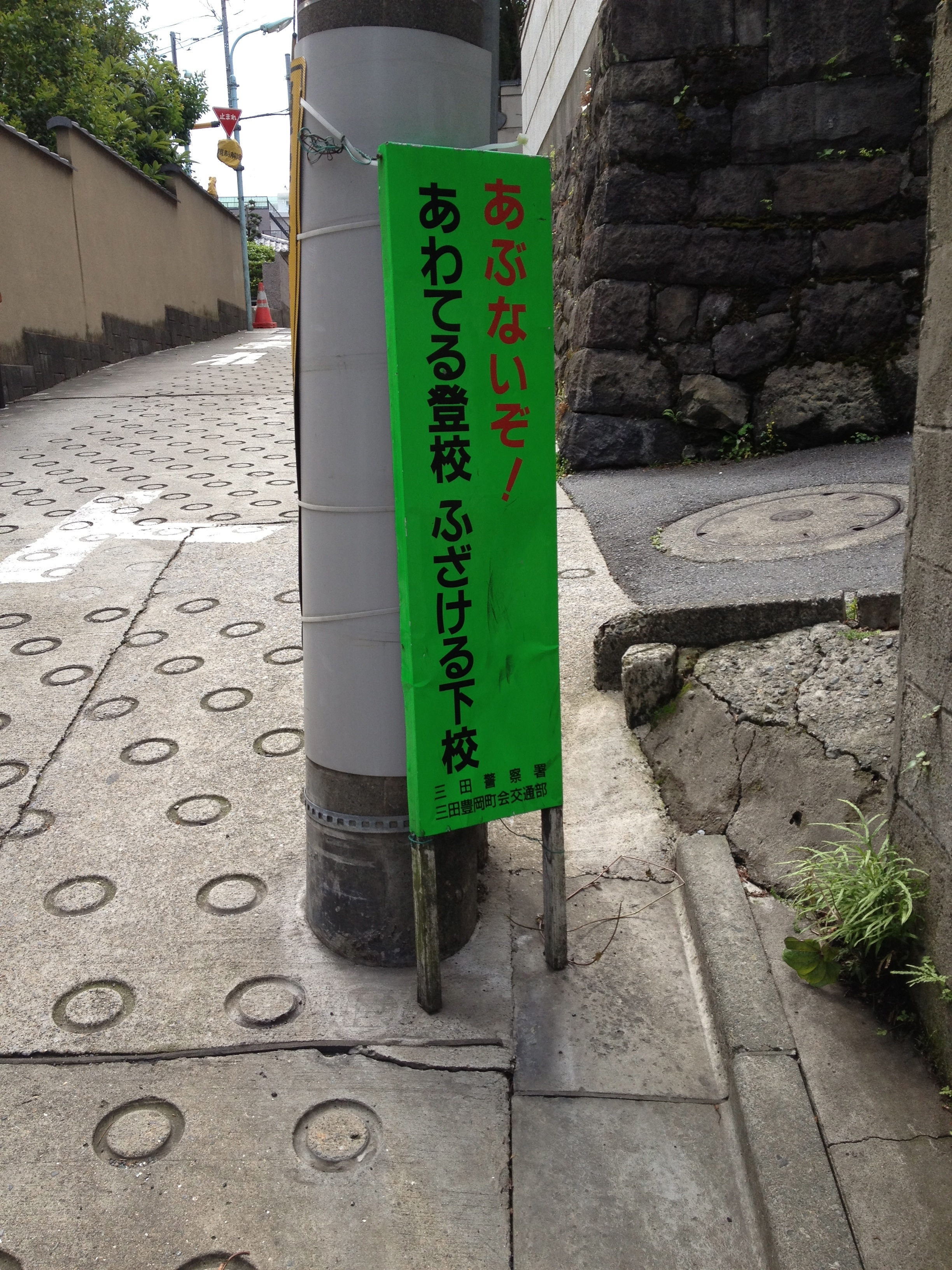 毎日新聞社 「交通安全スローガン」 S46 佳作 こども部門 [1]